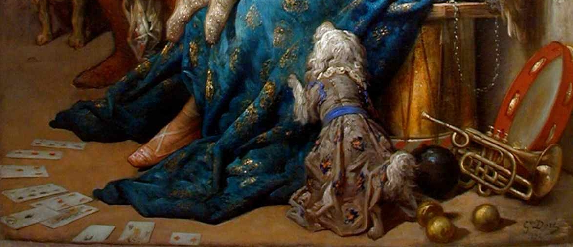 Détail du bas du tableau de Gustave Doré, Les Saltimbanques.